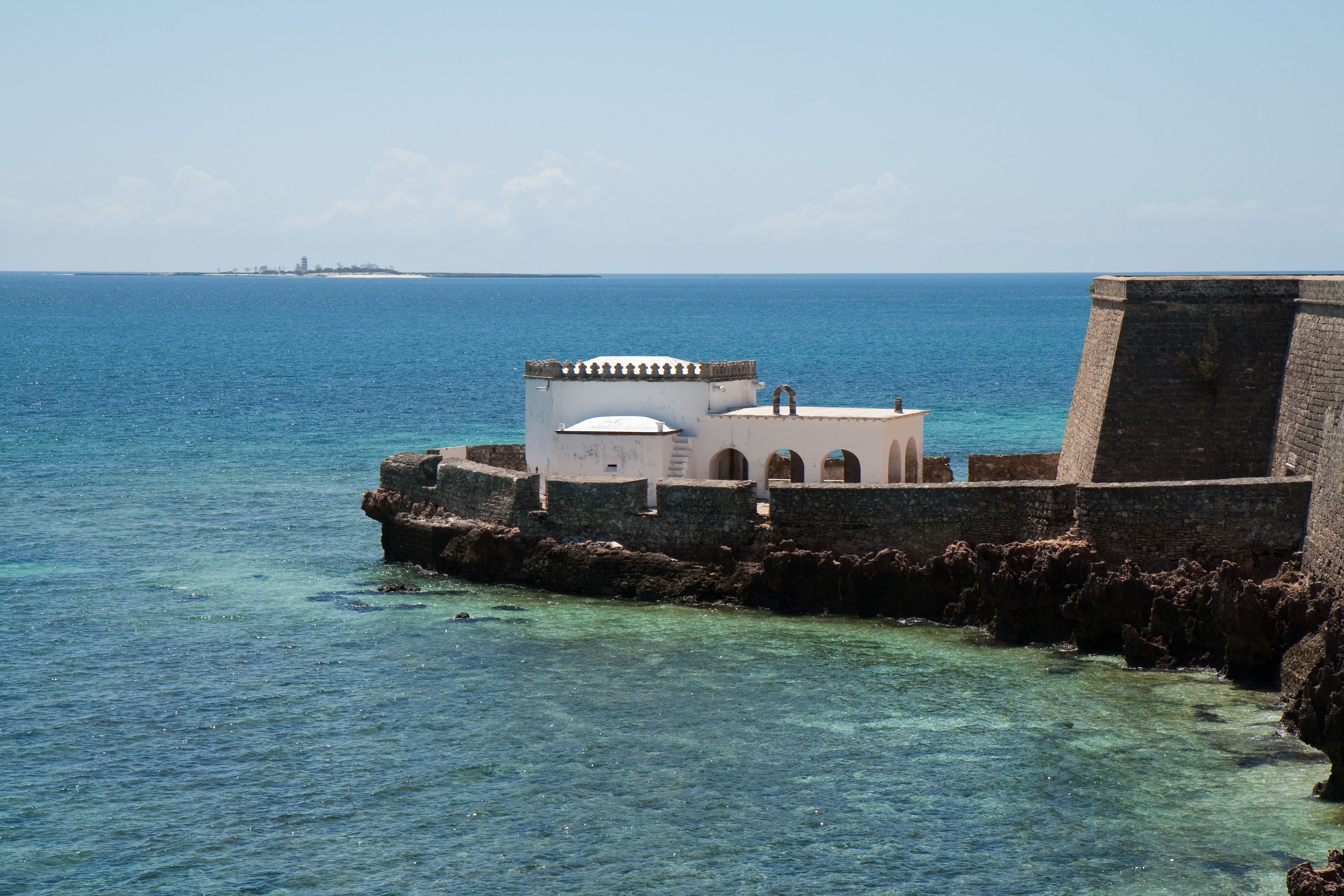 Chapel of Nossa Senhora de Baluarte, Ilha de Mozambique